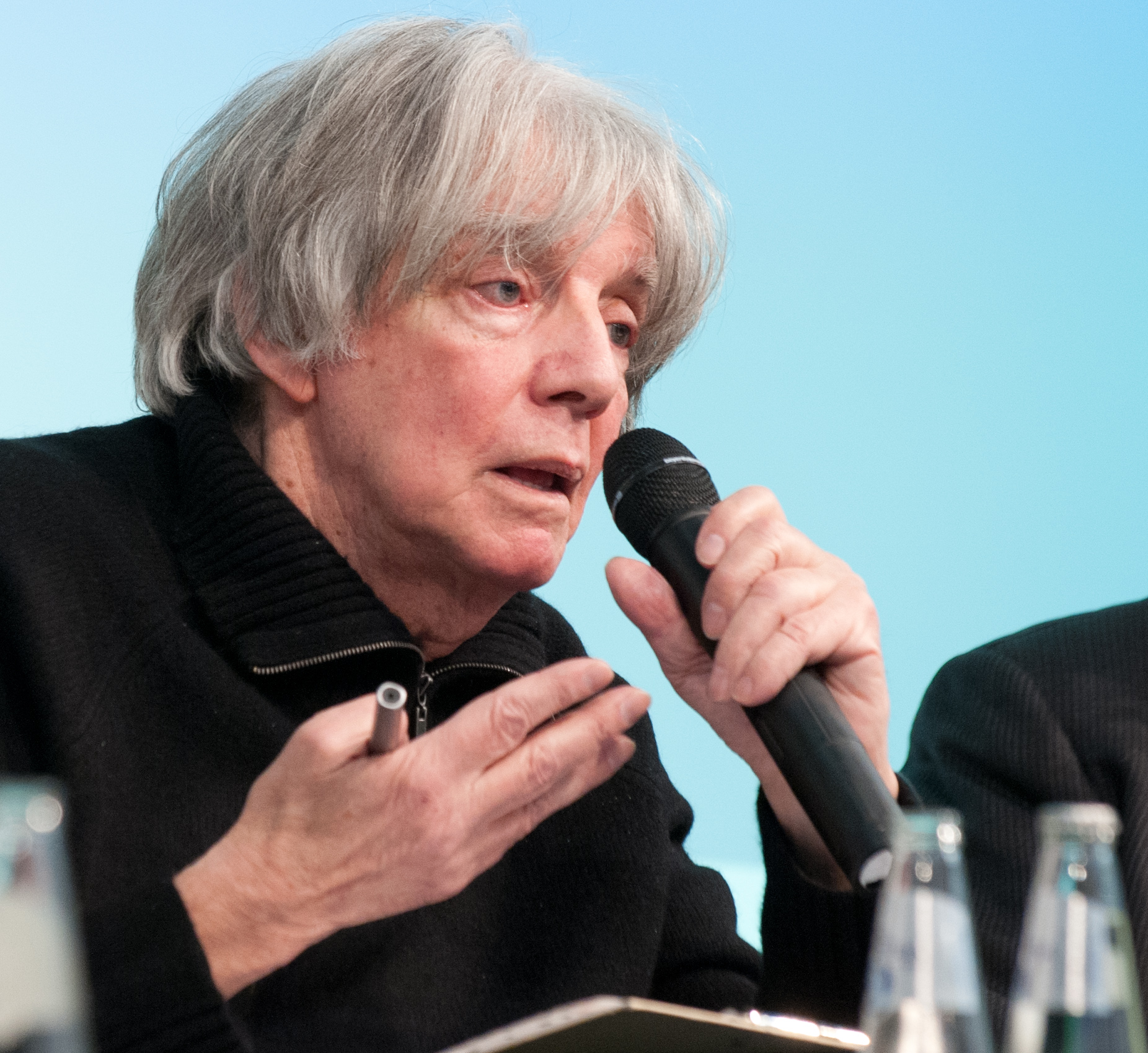 André Glucksmann (Philosoph und Publizist) Foto: Stephan Röhl Podiumsdiskussion „Mehr Europa wagen. Eine Intervention“. Heinrich-Böll-Stiftung in Kooperation mit dem Institut Français Berlin Mit André Glucksmann, Philosoph und Publizist Adam Michnik, Essayist und Publizist Peter Schneider, Schriftsteller Daniela Schwarzer, Stiftung Wissenschaft und Politik Moderation: Ralf Fücks, Vorstand, Heinrich-Böll-Stiftung